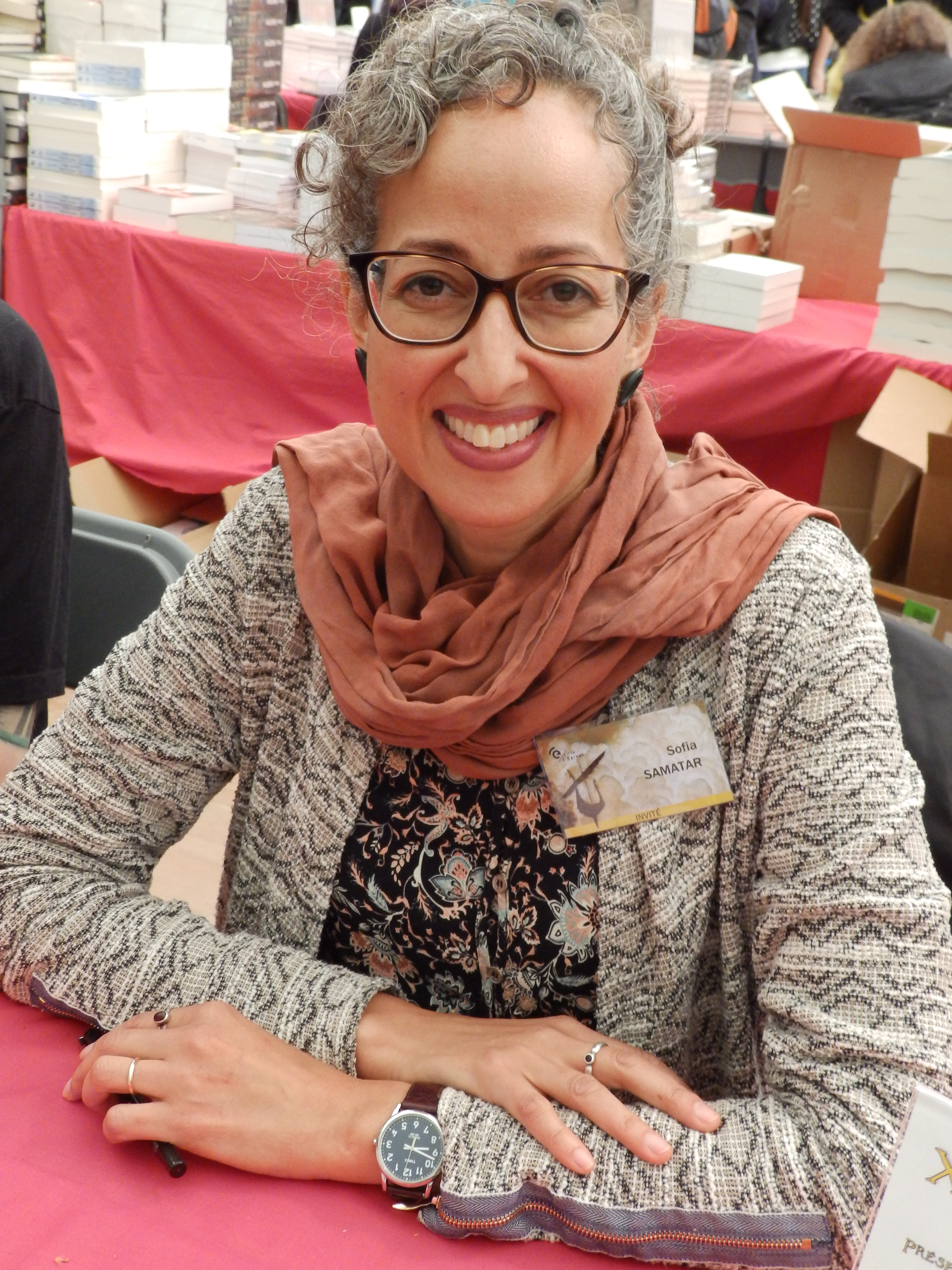 La romancière de fantasy Sofia Samatar lors du 16e festival des mondes imaginaires Les Imaginales à Epinal en mai 2017